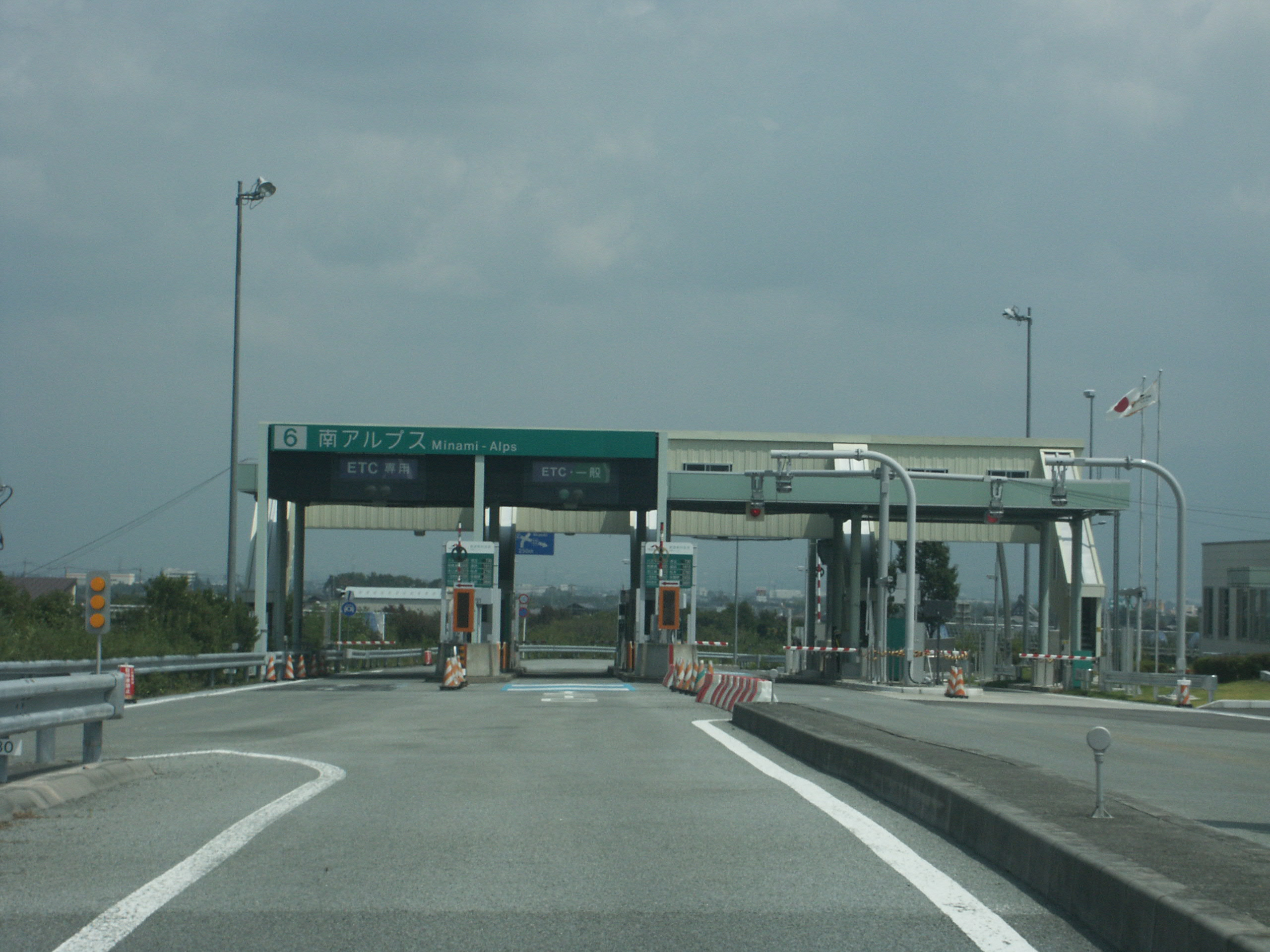 中部横断自動車道南アルプスインターチェンジ料金所付近